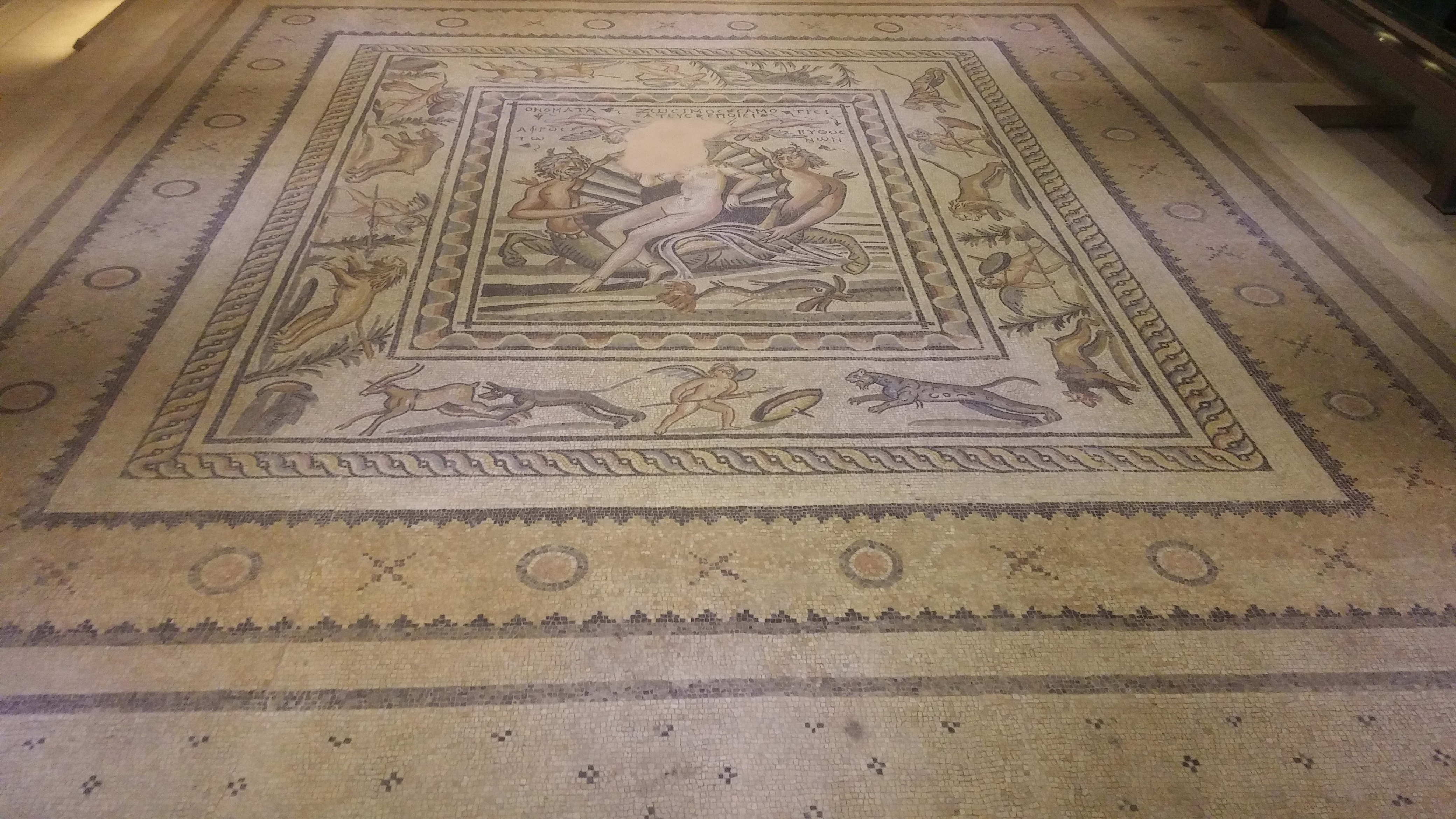 M.S. 2.-3. Yüzyıl Zeugma Antik Kenti, Poseidon Villası